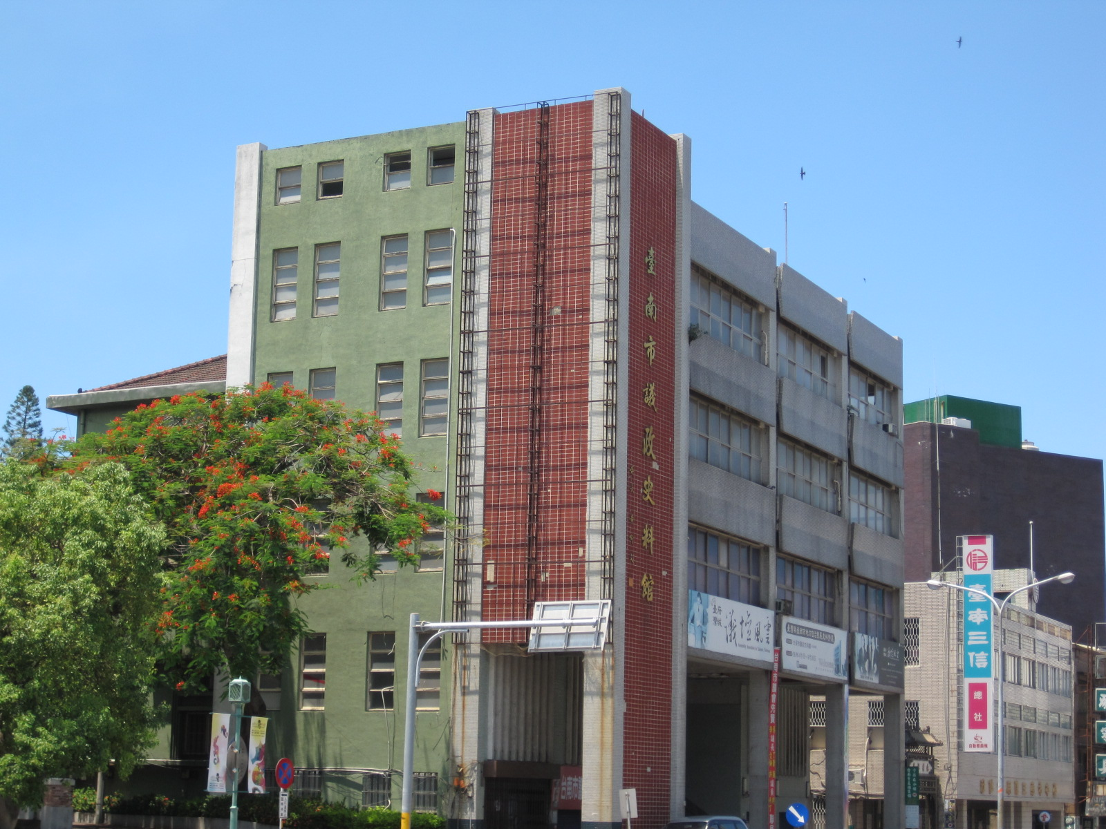 原台南州會